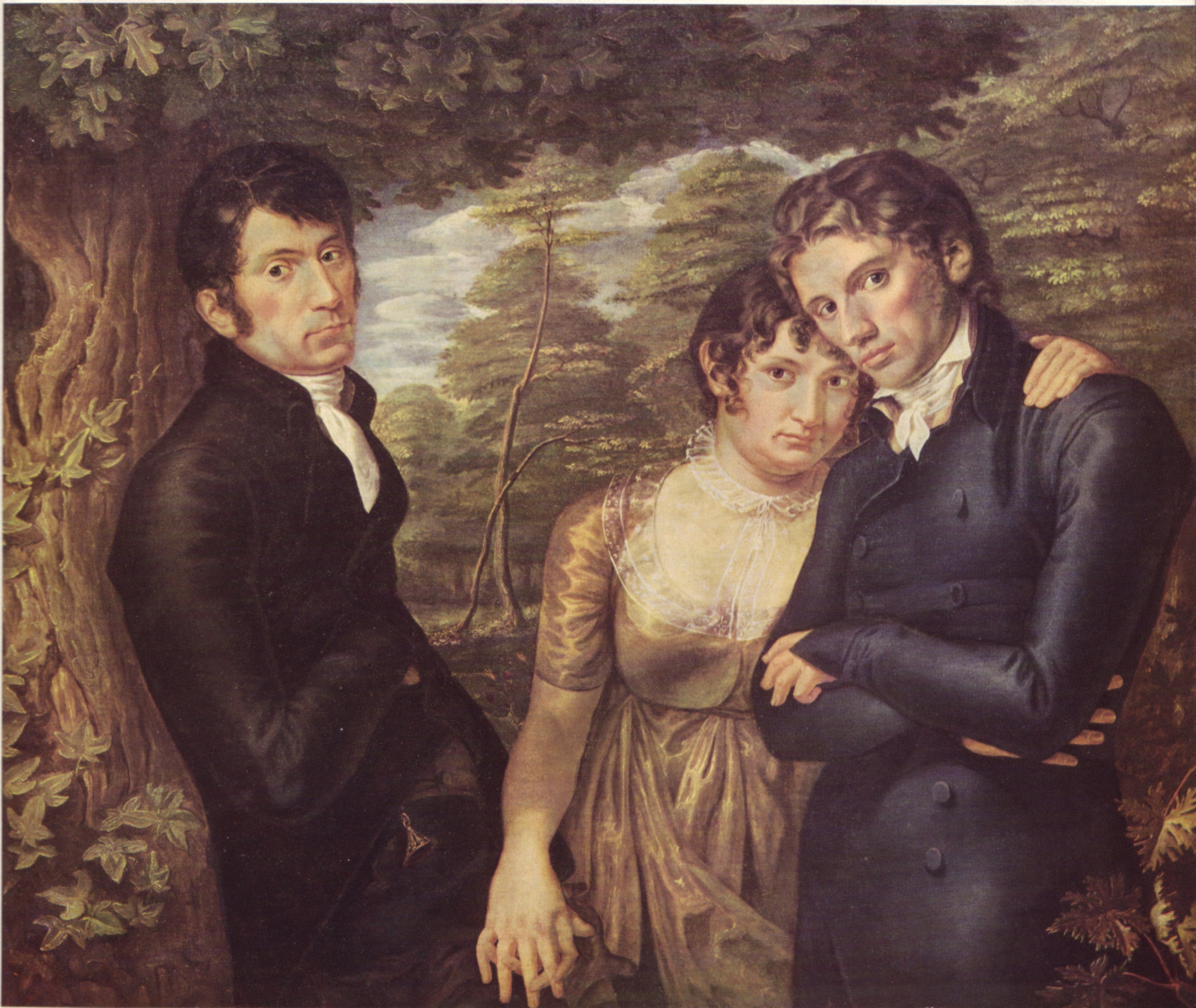 Gruppenporträt von Philipp Otto Runge mit Selbstdarstellung des Künstlers (rechts) zusammen mit seiner Frau Pauline und seinem Bruder Johann Daniel Runge (links).